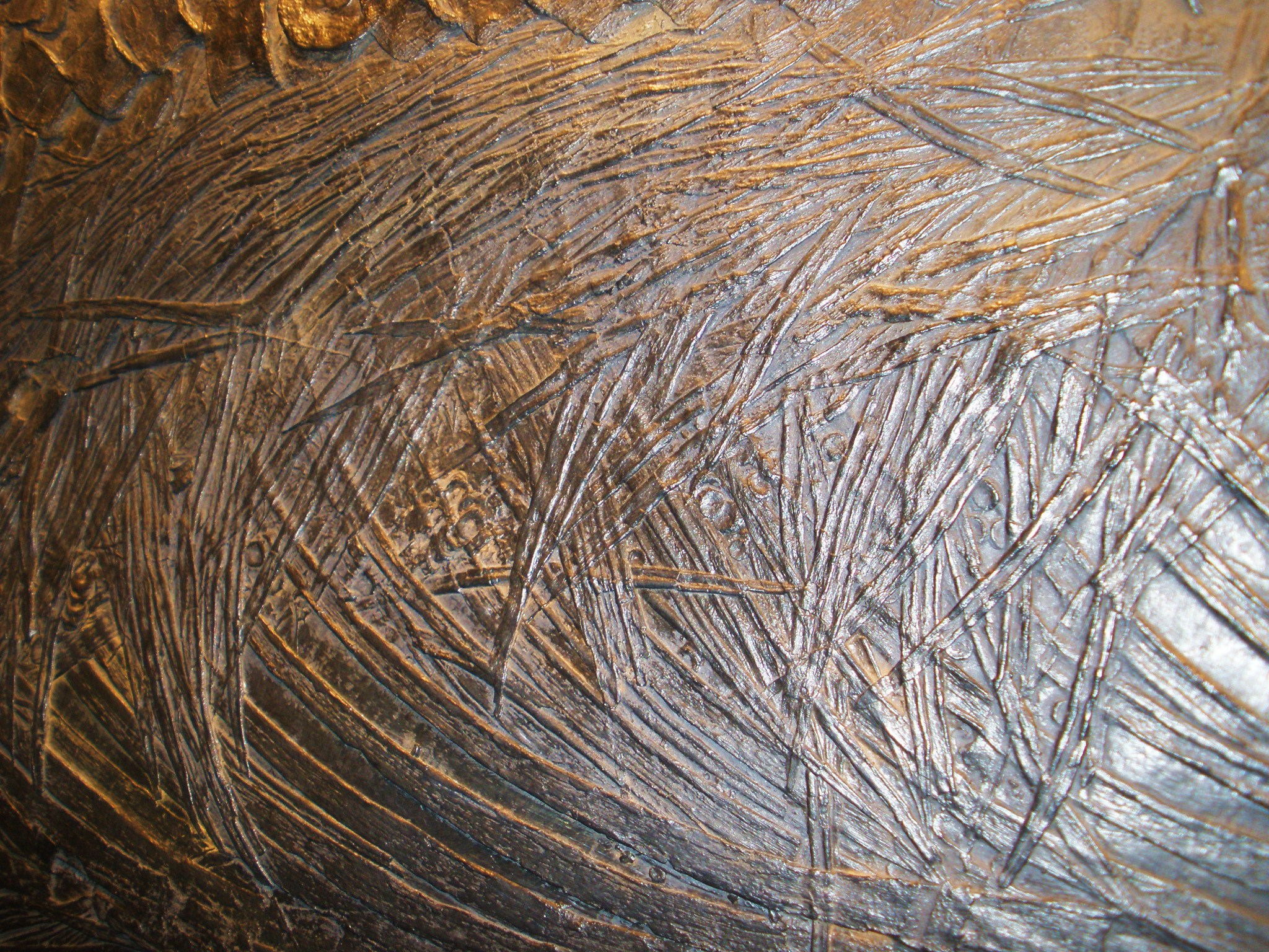 Fossil of Besanosaurus, an extinct reptile. - Took the photo at Museo dei Fossili di Besano